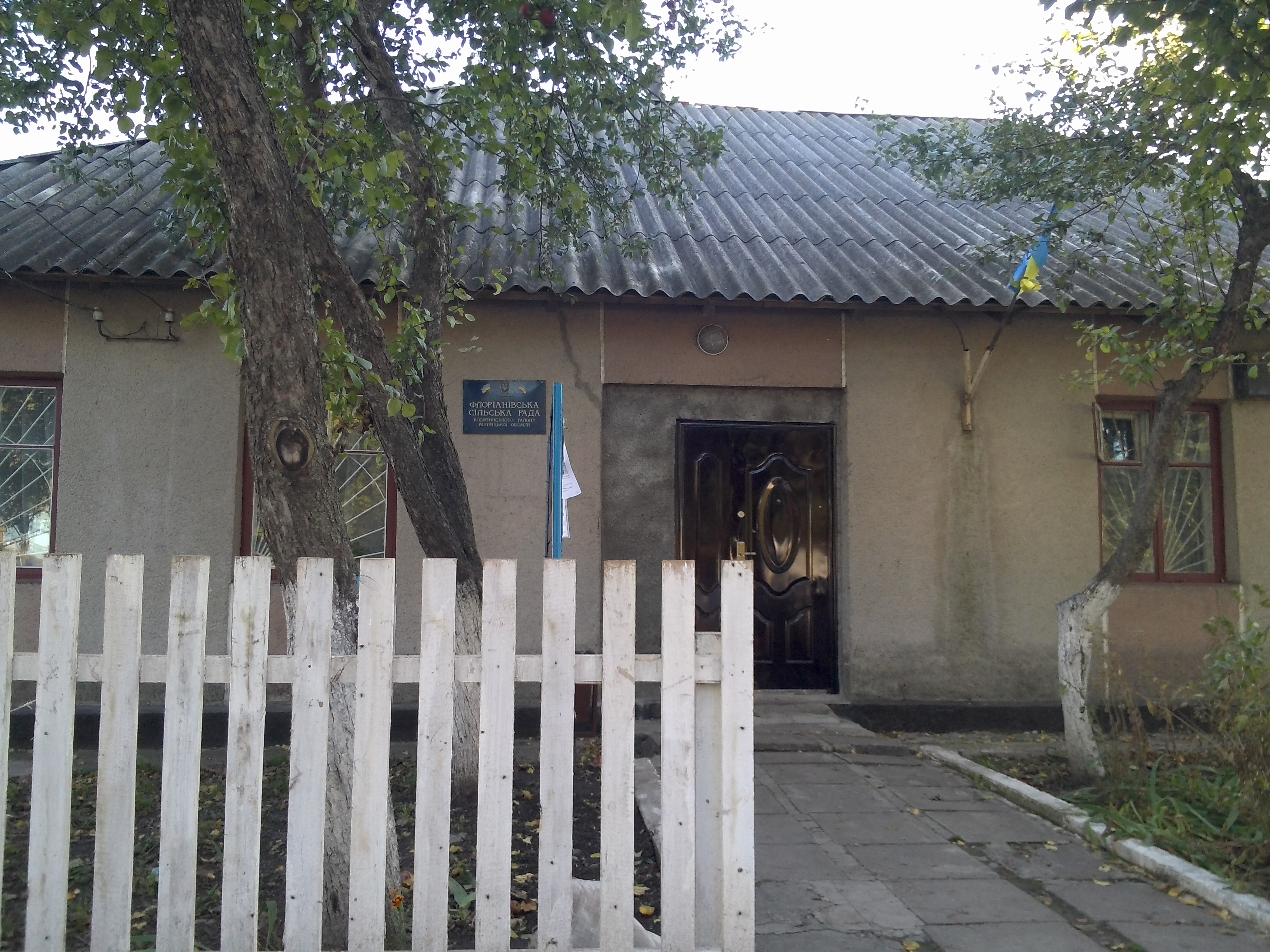 Флоріанівська сільська рада